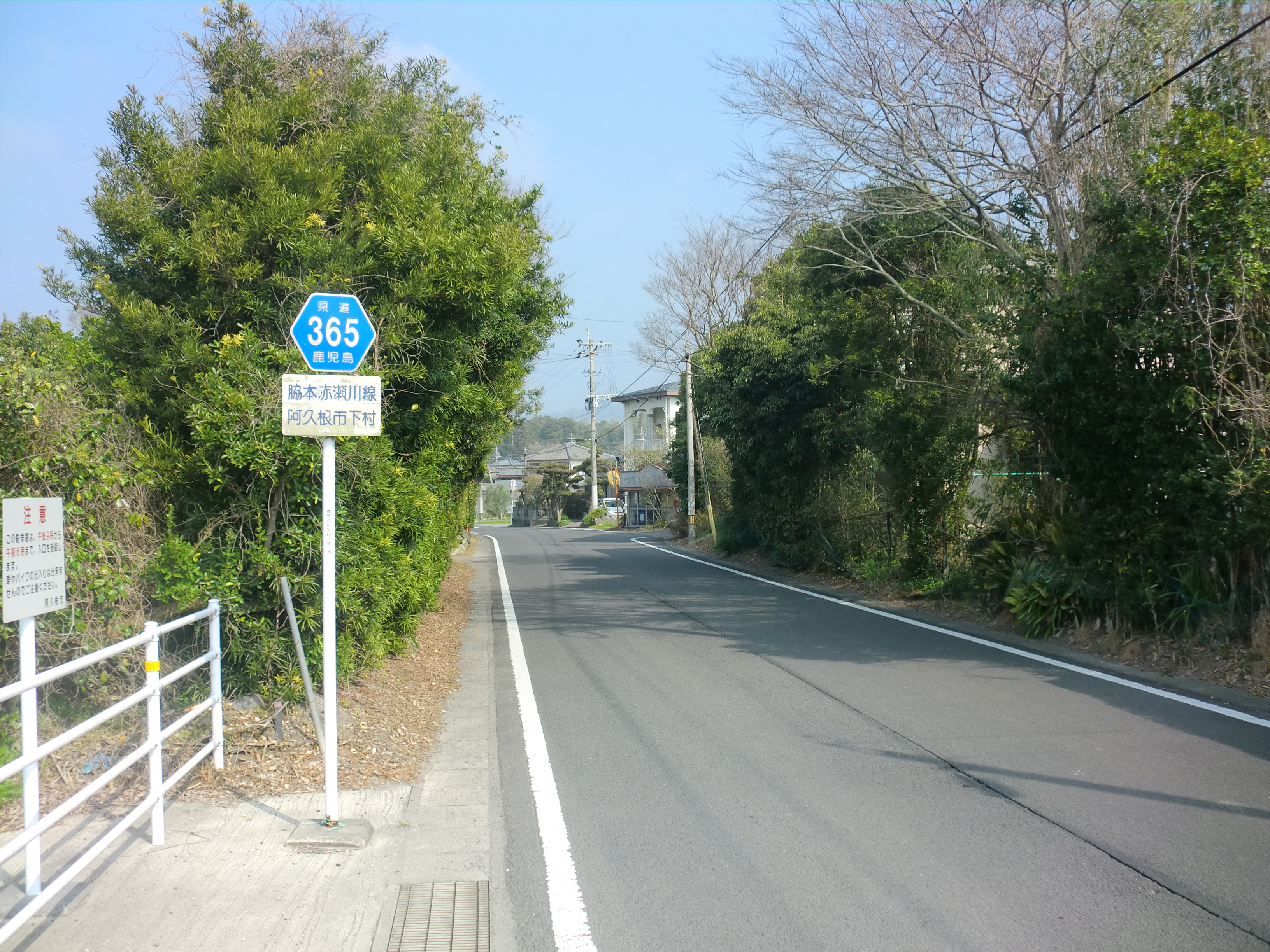 鹿児島県道365号脇本赤瀬川線。阿久根市で撮影。